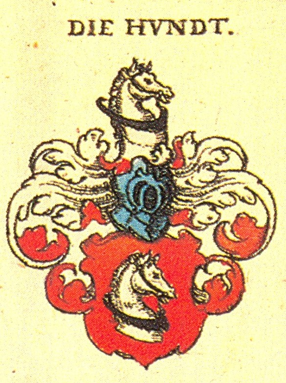 Ritterschaft und Adel in Franken Wappen der Familie Hund von Wenkheim.